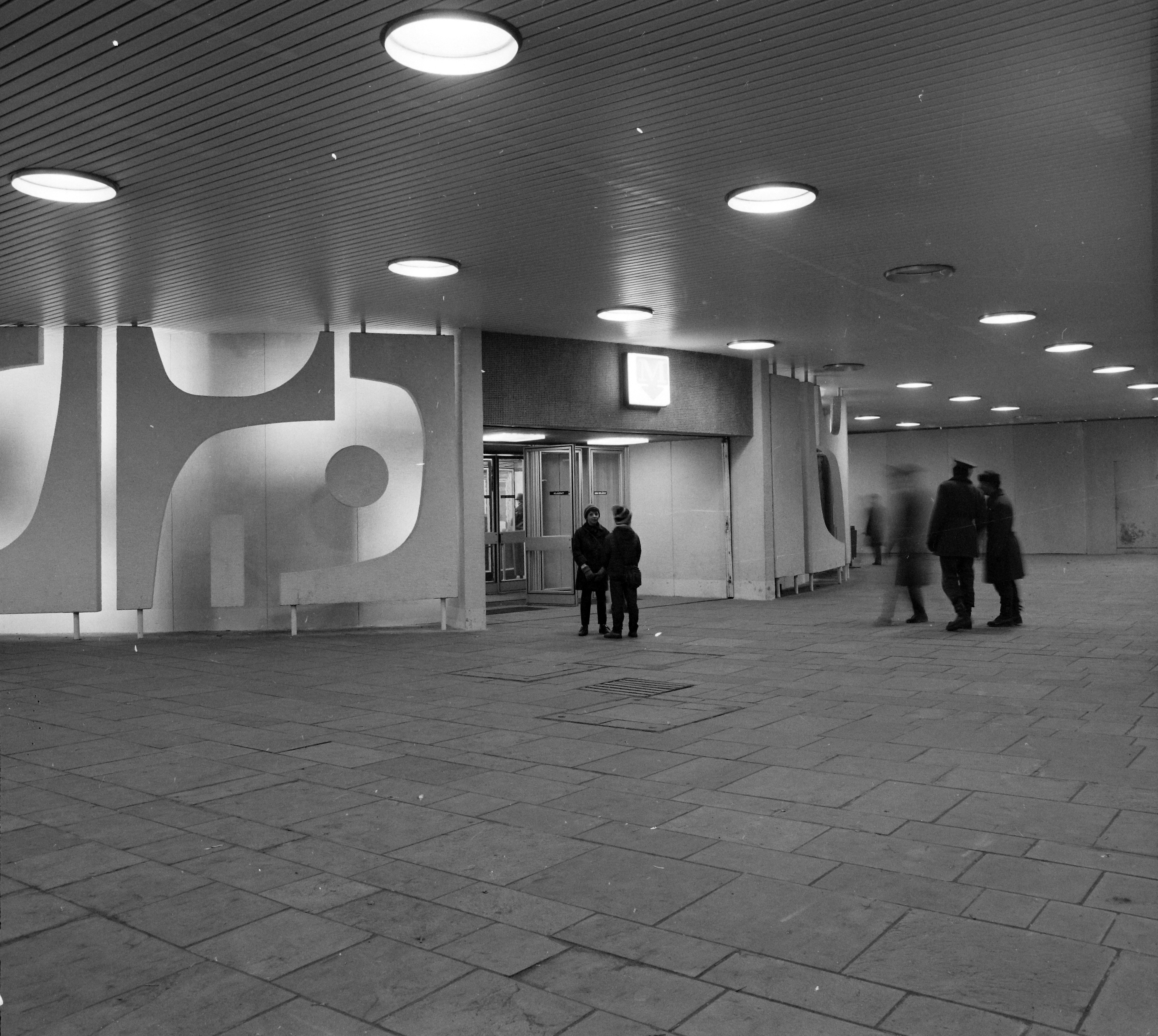 Déli pályaudvar, a metróvégállomás utascsarnokának bejárata. Location: Hungary, Budapest I. Tags: Budapest Title: Déli pályaudvar, a metróvégállomás utascsarnokának bejárata.